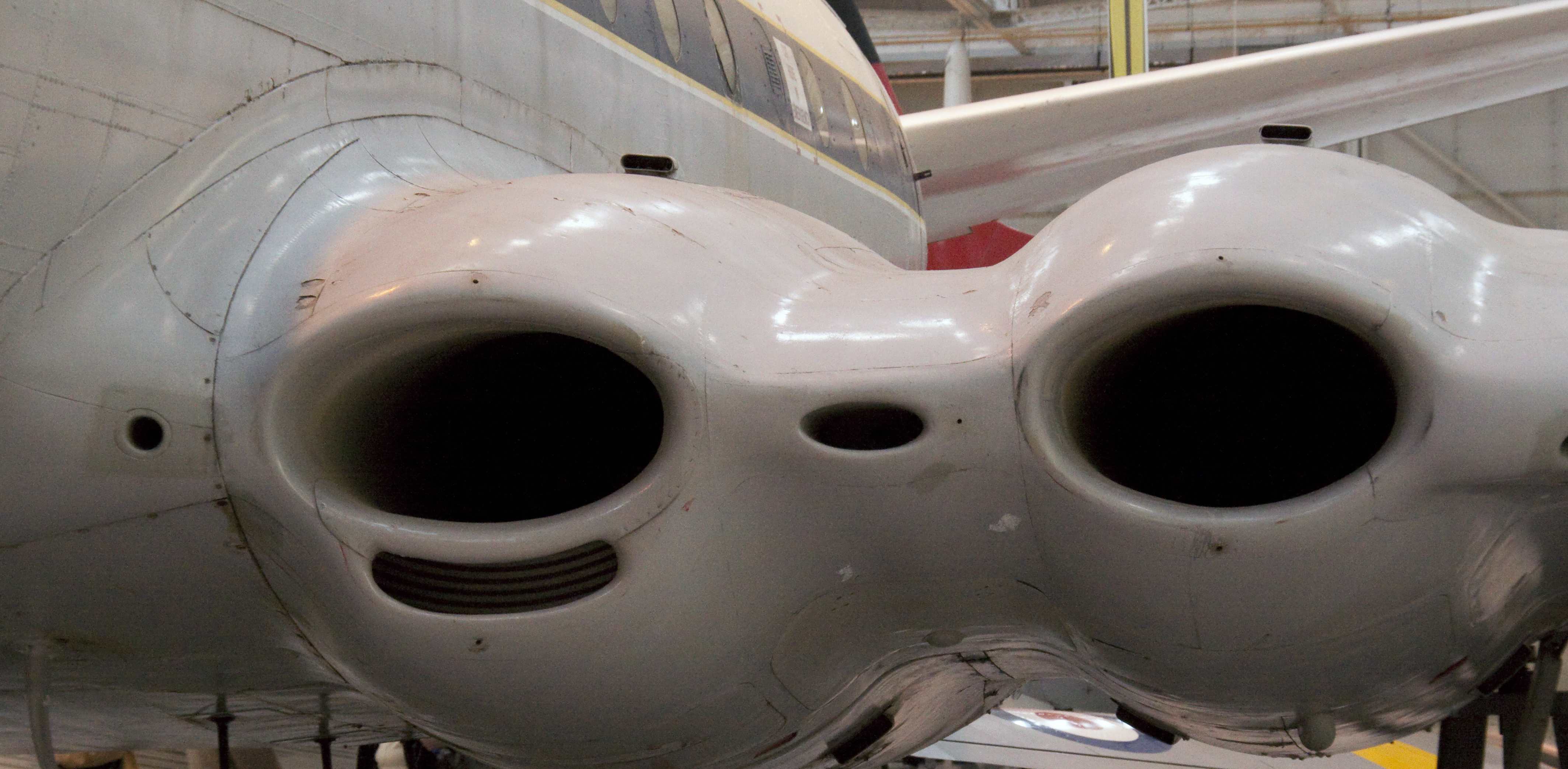 Comet intakes